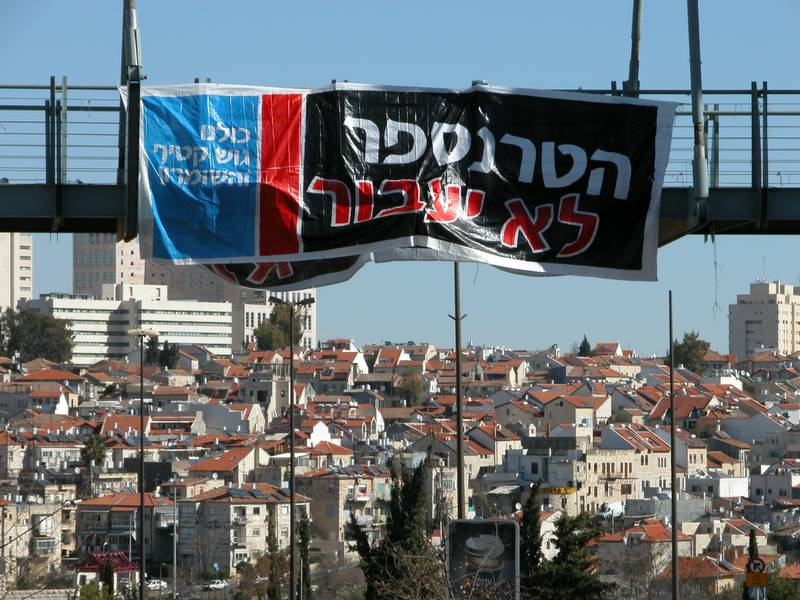 כרזה נגד תוכנית ההתנתקות על גשר בית המשפט העליון. צולם על ידי אפי ב.